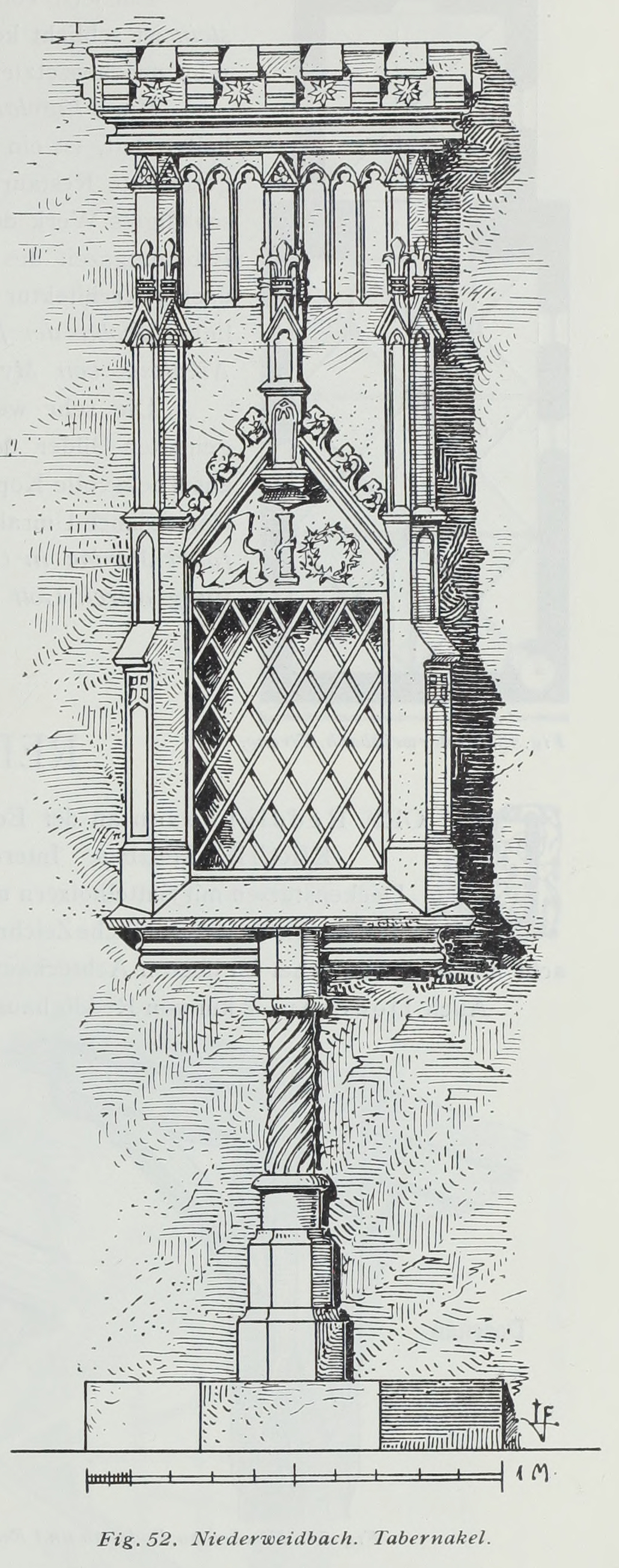 Niederweidbach Tabernakel